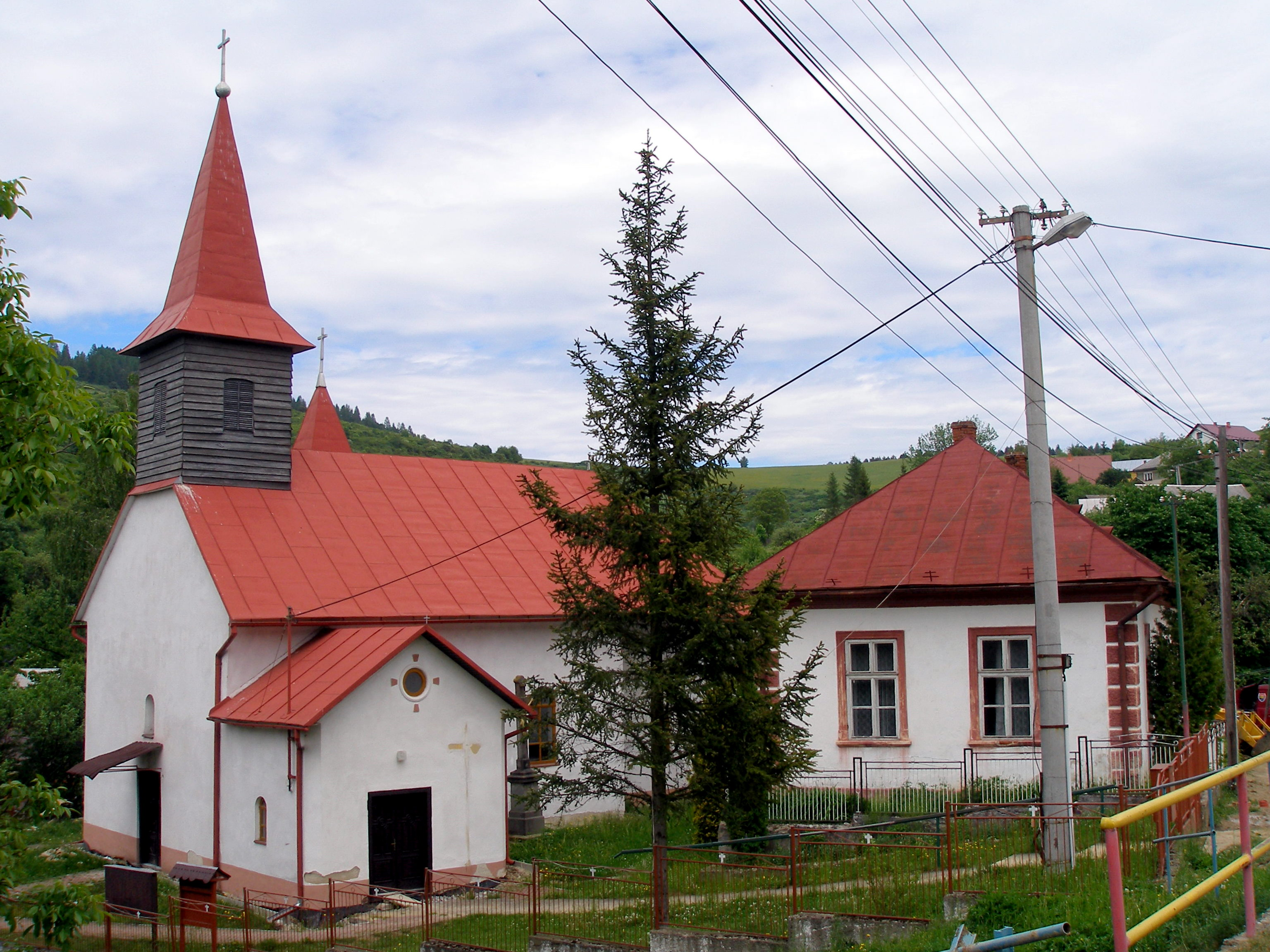 Obec Vysoká okres Sabinov